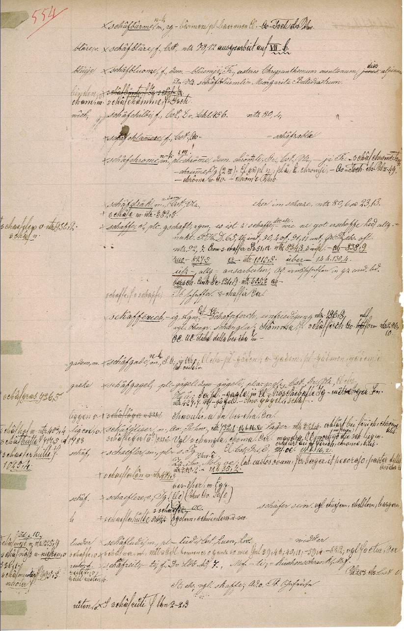 Seite aus Martin Tschumperts Manuskript für ein «Bündnerisches Idiotikon». Archiv des Schweizerischen Idiotikons, Zürich.